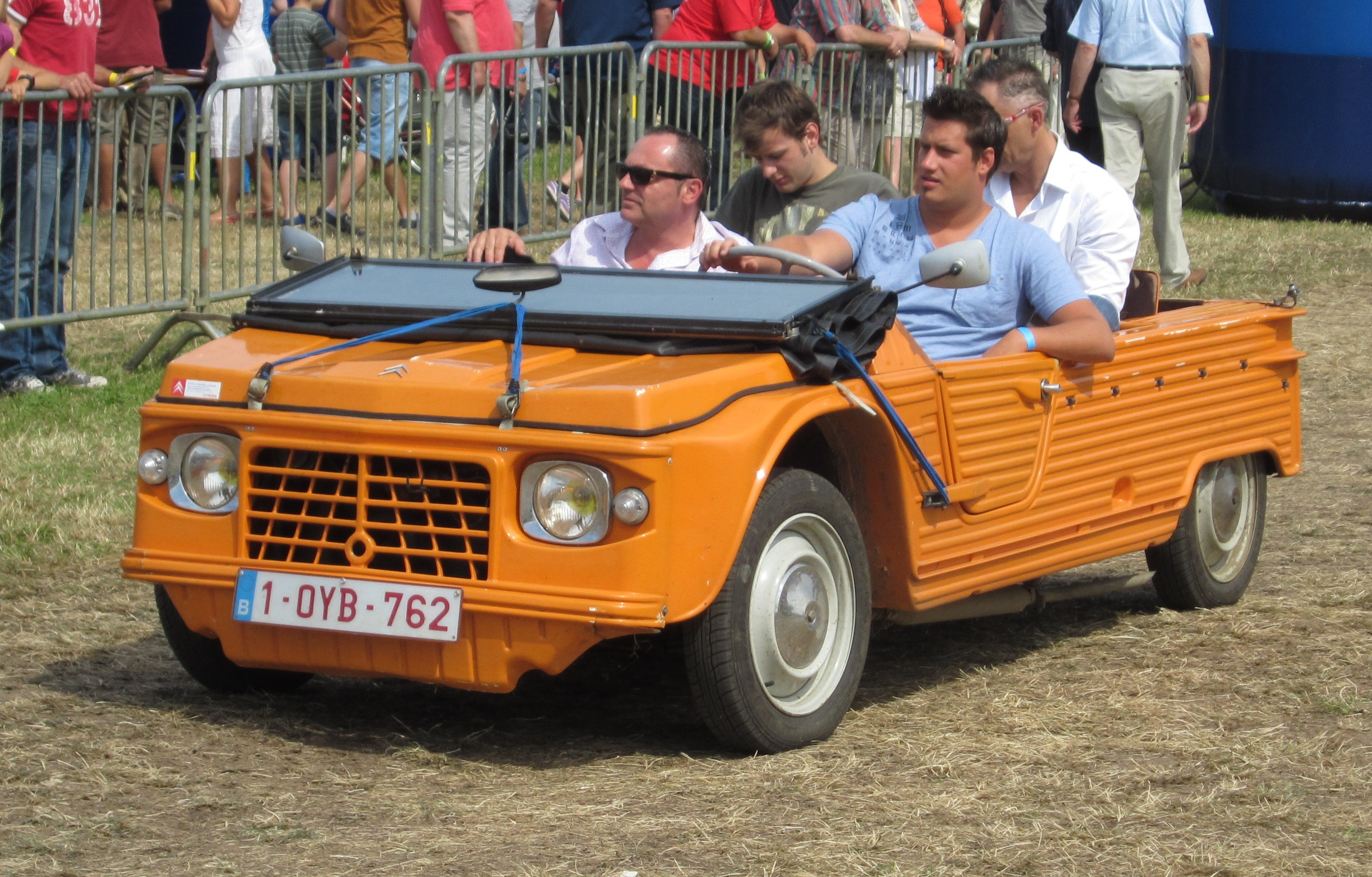 Citroën Méhari roulant en Belgique